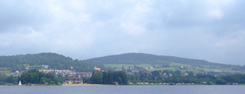 Blick auf Horní Planá von der südlichen Seite des Lipno Stausees.